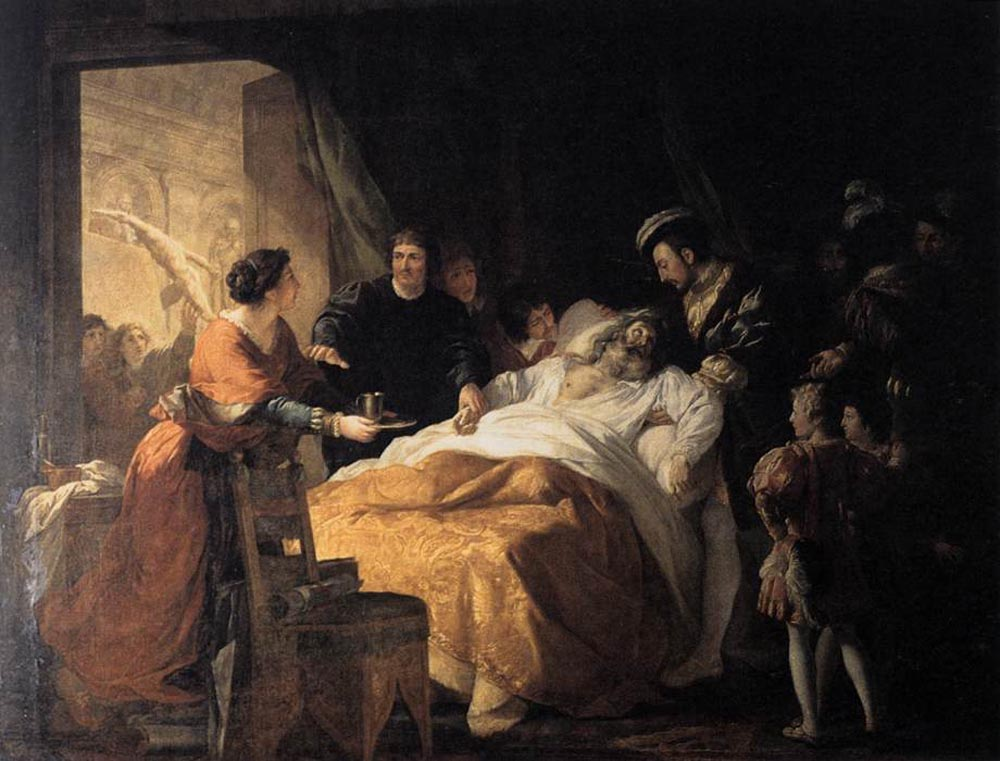 La morte di Leonardo, olio su tela, 278 x 357 cm, Musée de l'Hôtel Dieu, Beaune